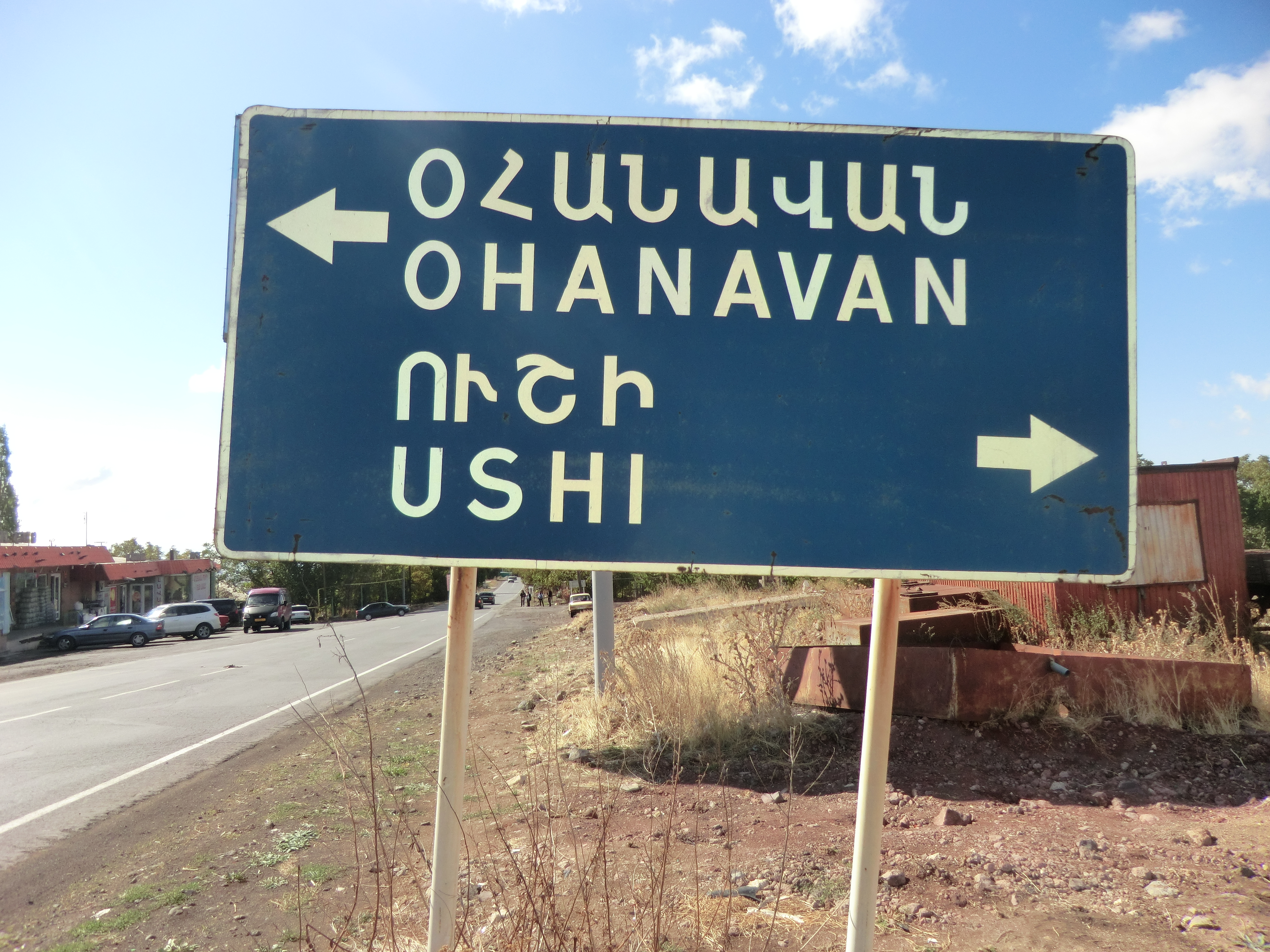 Panneau près d'Ohanavan.